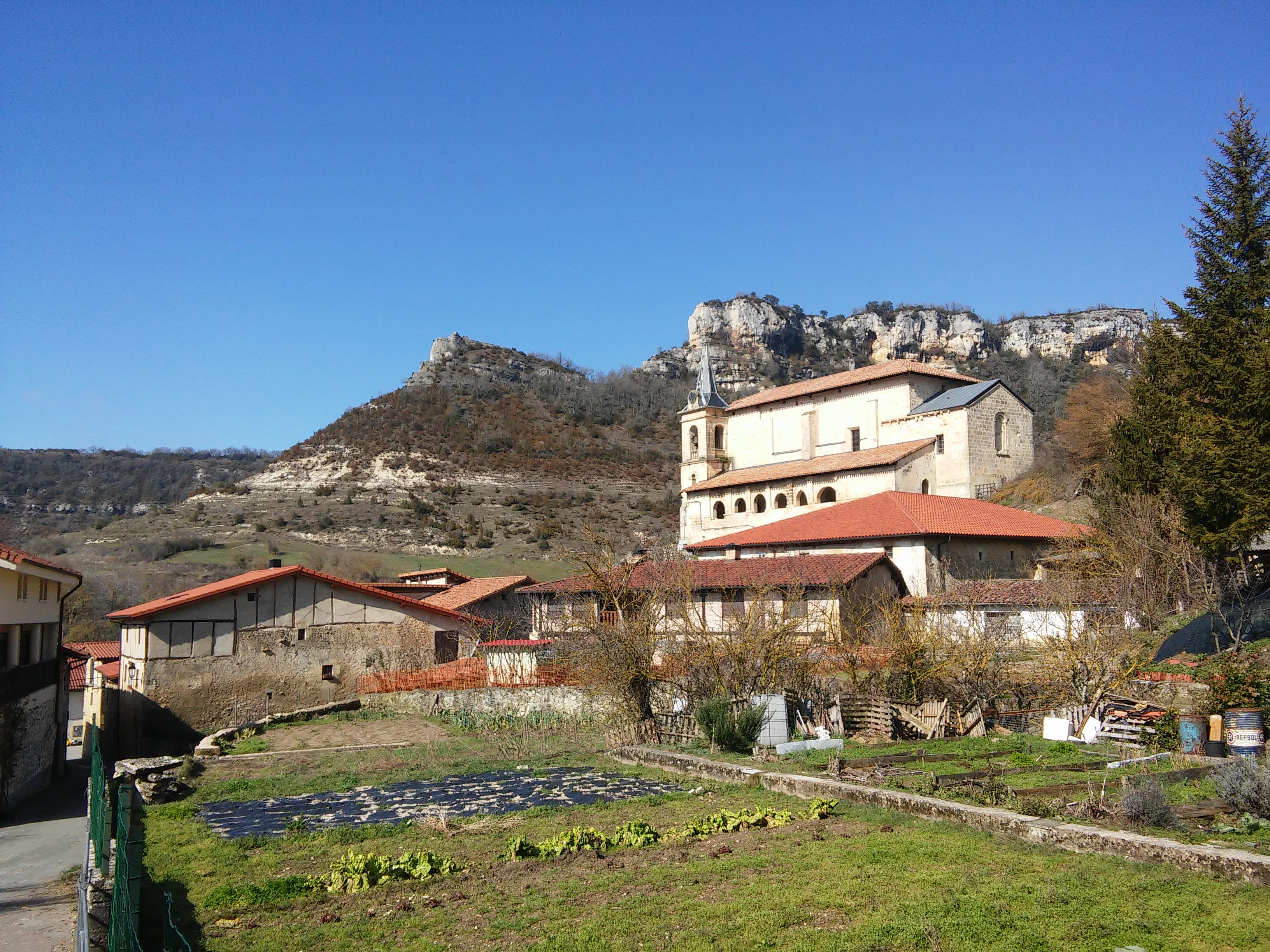 Arluzearen ikuspegia San Justi mendirako bidetik